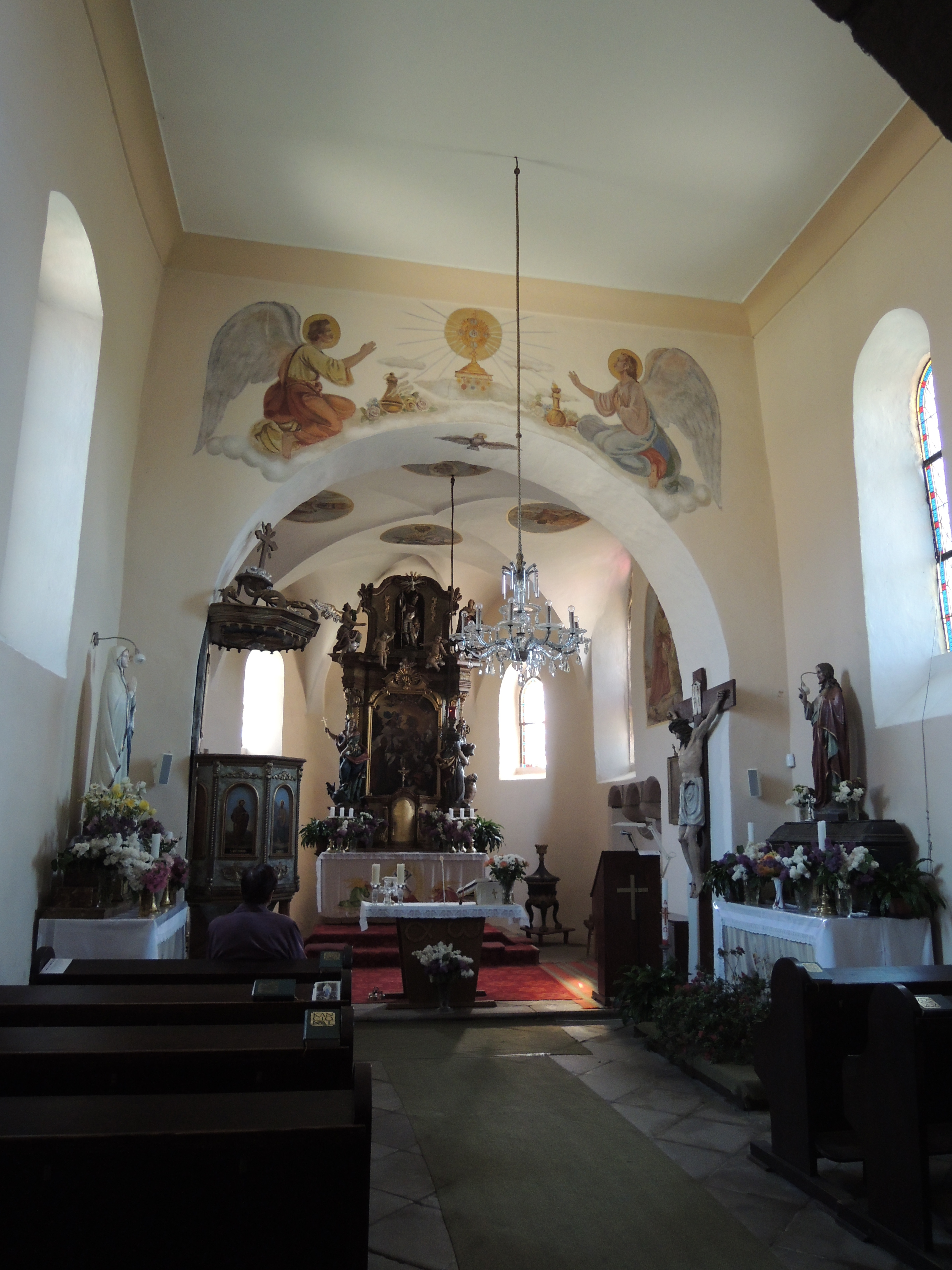 Pohled do lodi kostela sv. Václava, Chřenovice